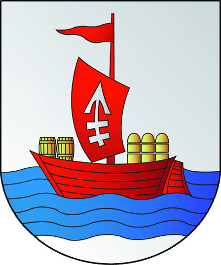 Беларуская (тарашкевіца): Герб мястэчка Бешанковічаў